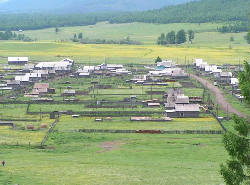 Village of Ulentuy